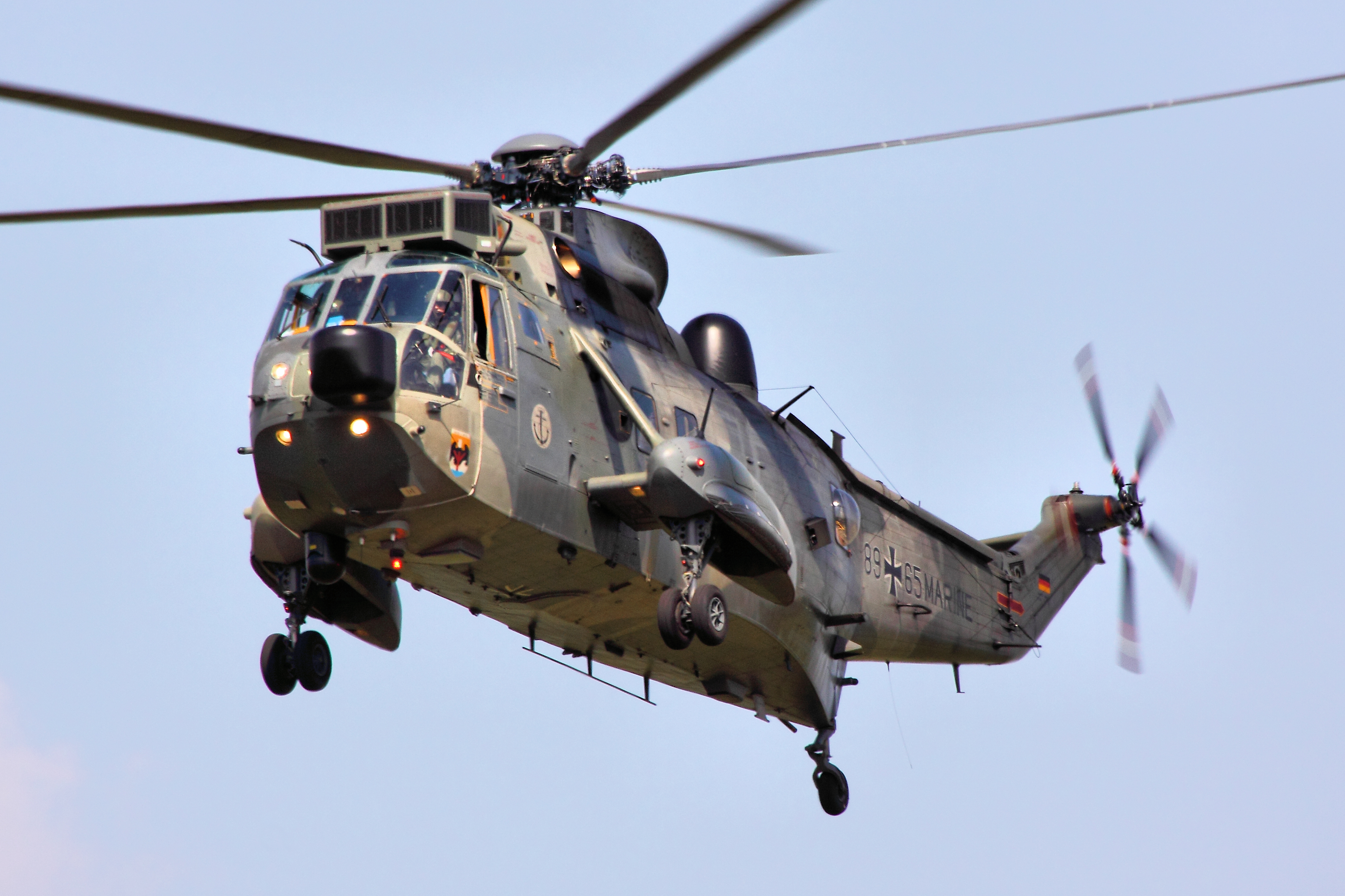 Sea King - RIAT 2013